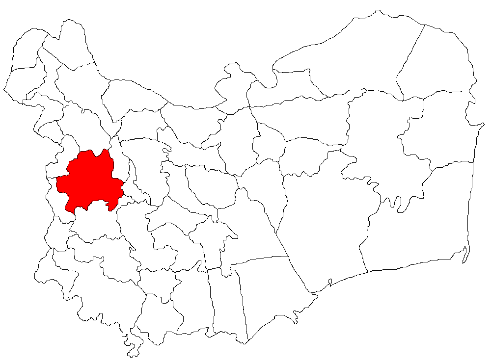 Categorie:Hărţi ale judeţului Tulcea